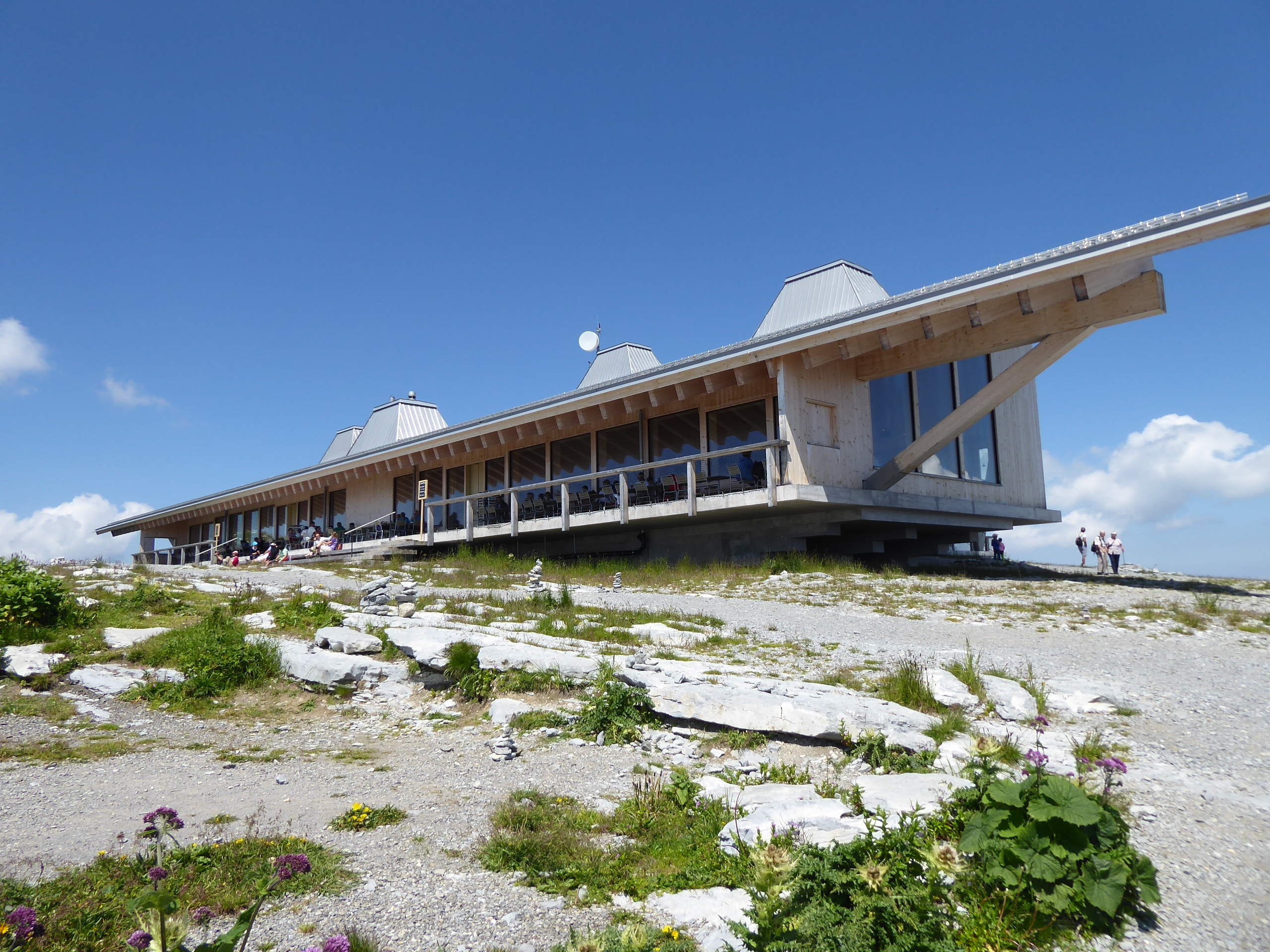 Berghaus auf dem Chäserrugg (Gemeinde Unterwasser) von Jacques Herzog und Pierre de Meuron.